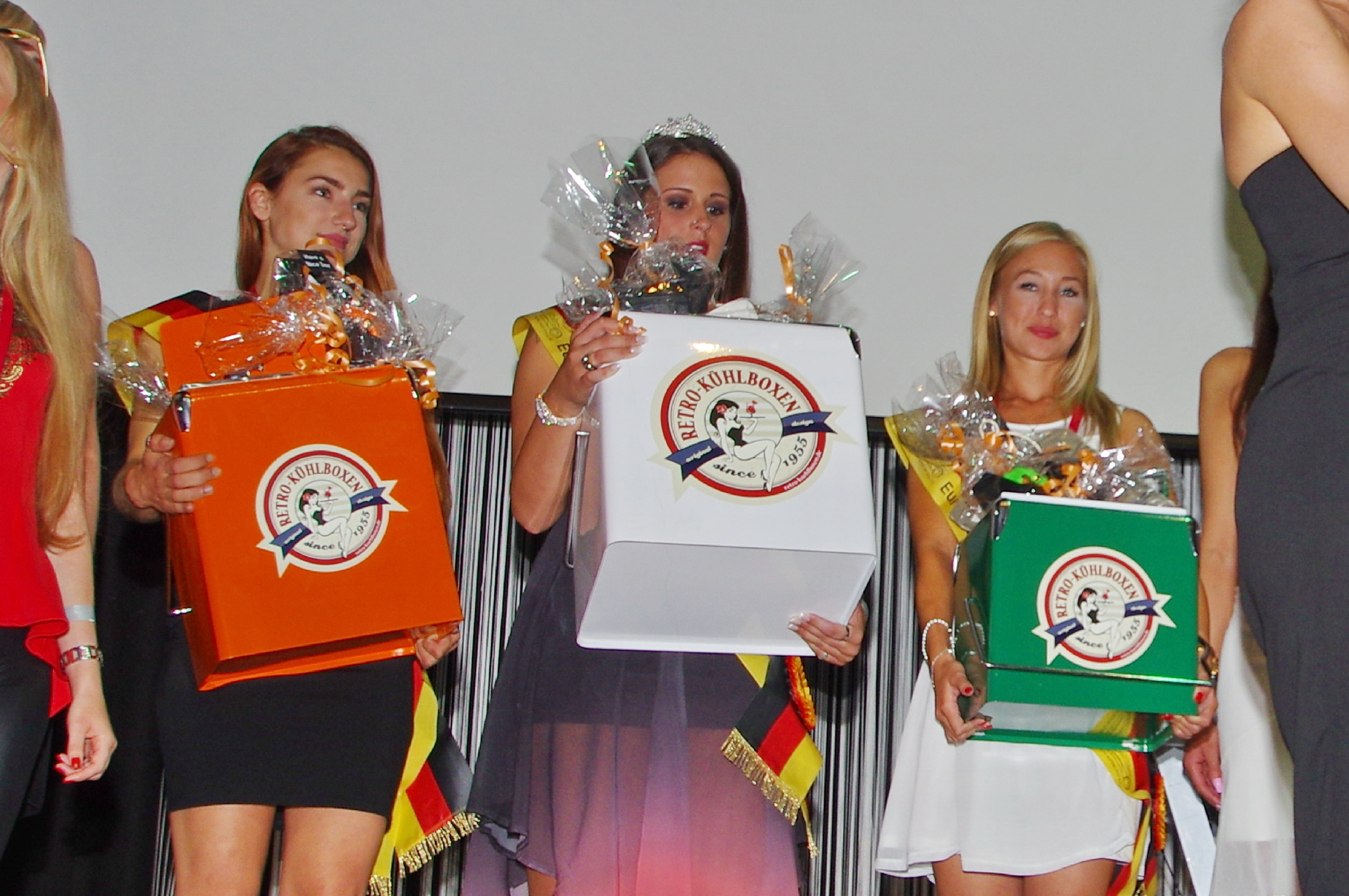 Die Sigerinnen des Racing-Queen Kontests mit ihren Preisen.